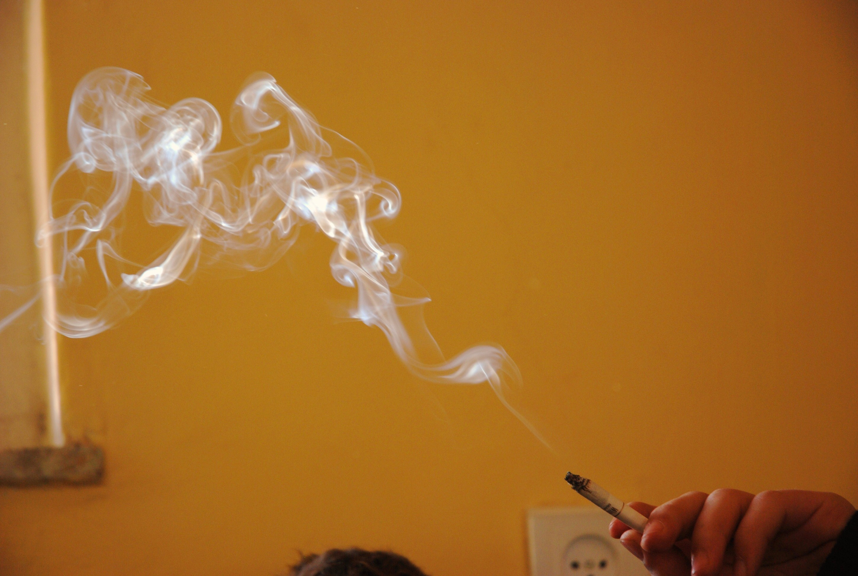 עשן סיגריה